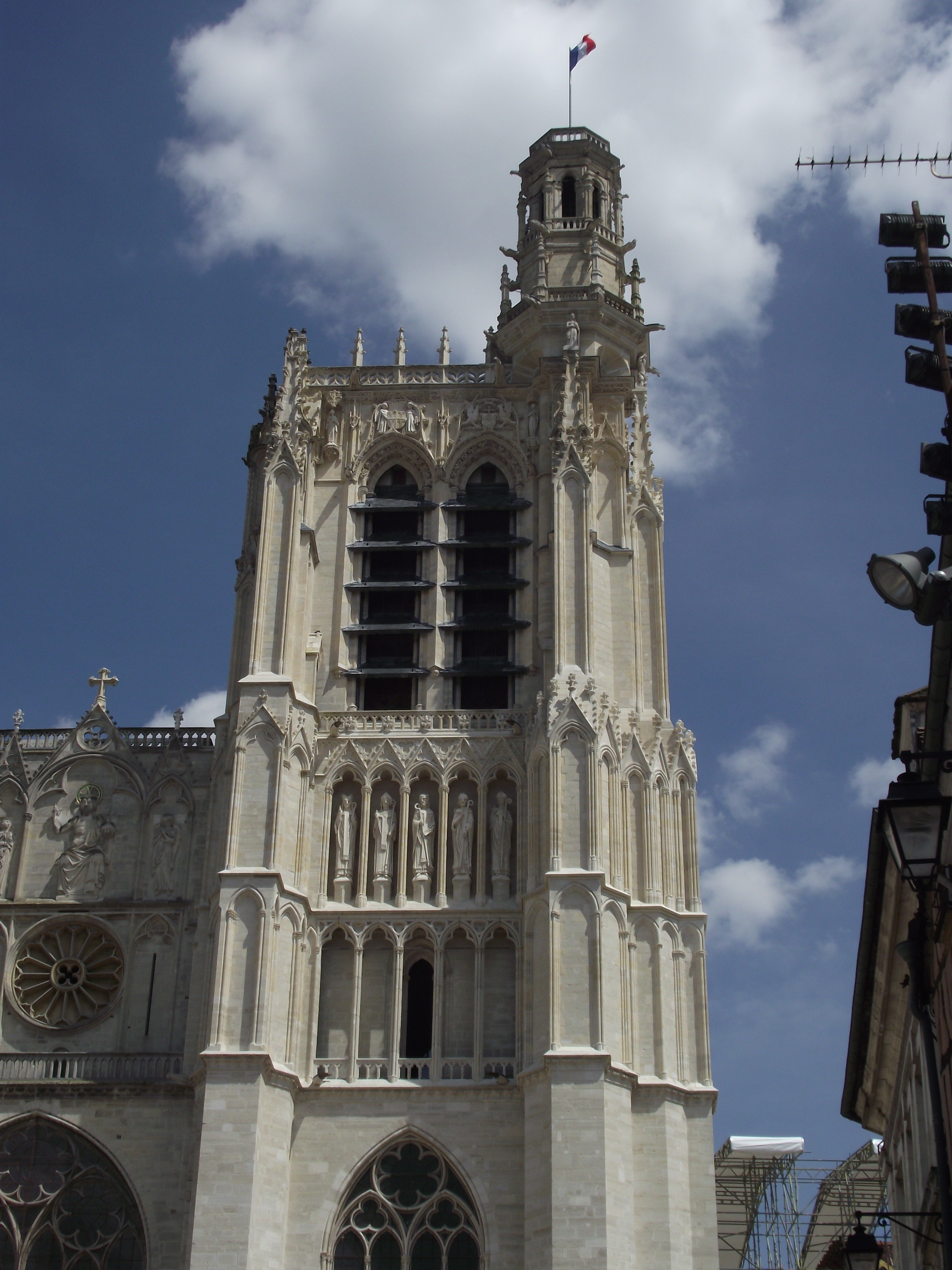 Sens, Facciata della Cattedrale di santo Stefano, "Tour de Pierre"